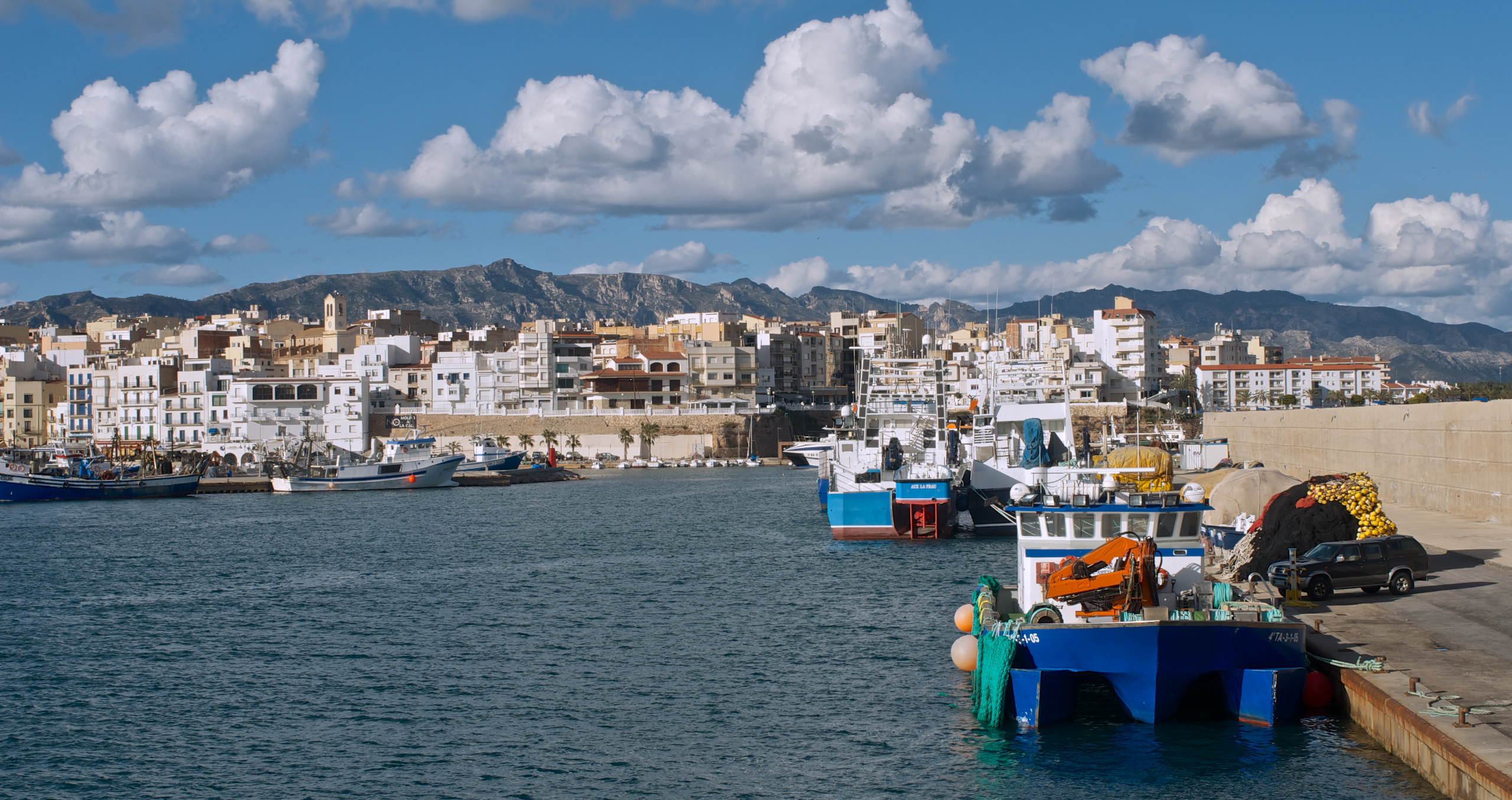 Port de L'Ametlla, Golf de Sant Jordi, Catalunya